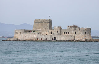 Description : forteresse Bourdzi. Nafplio (Nauplie), Grèce Date : 11 avril 2004 Auteur : Ifernyen Source : Archives personnelles Statut : GFDL Ifernyen avril 2004